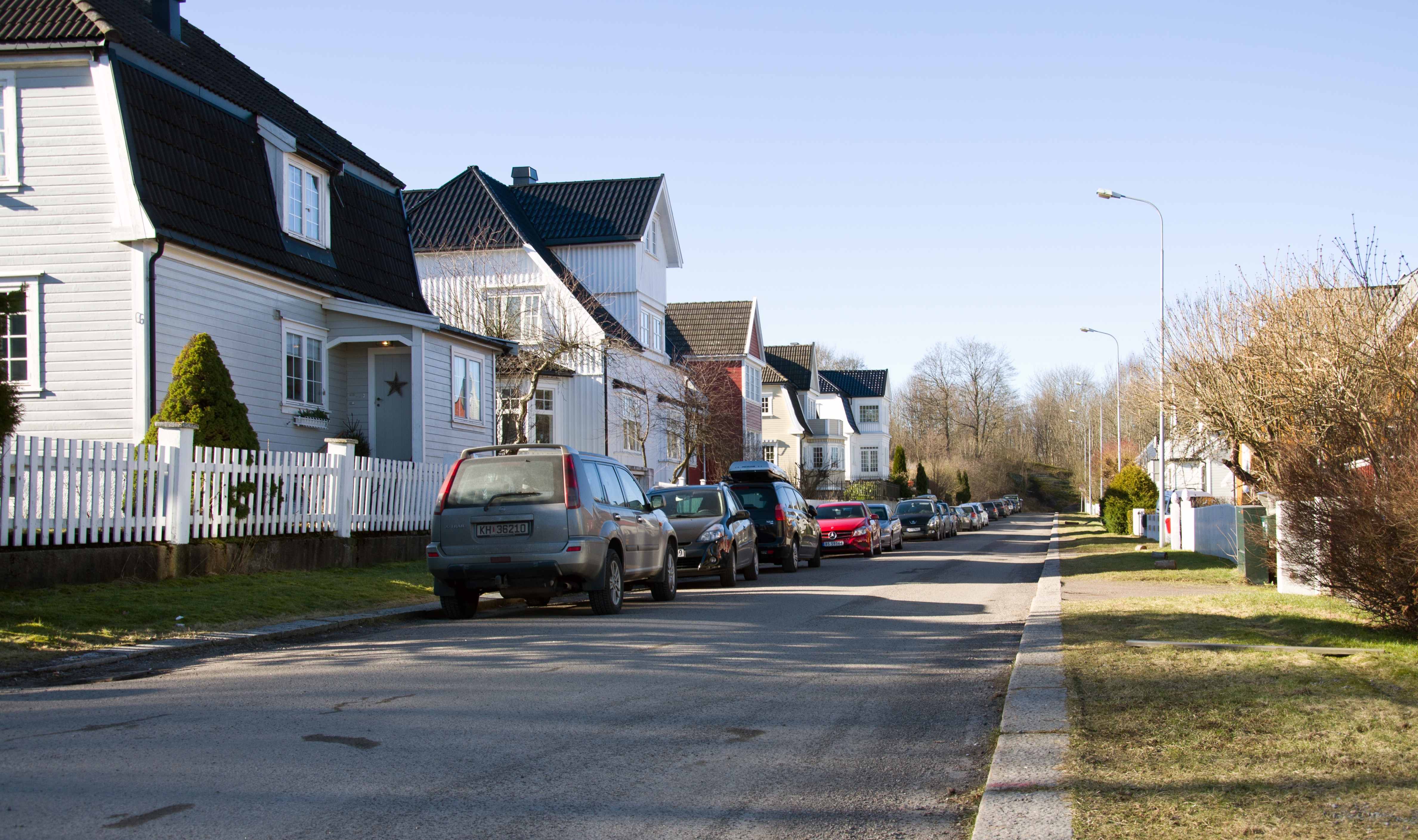 Enggaten i Tønsberg